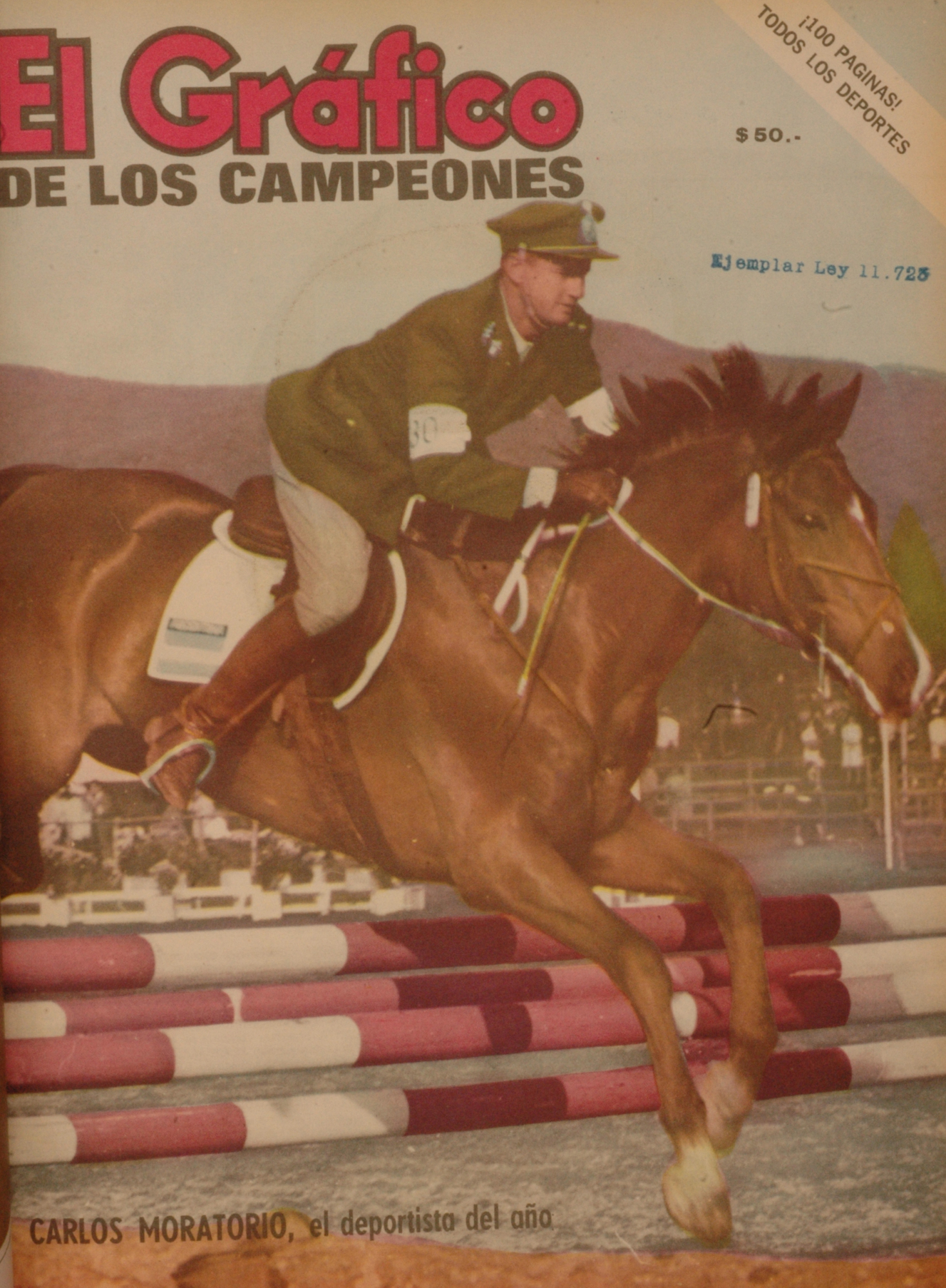 El Grafico del 20 de Enero de 1965. Edicion 2363